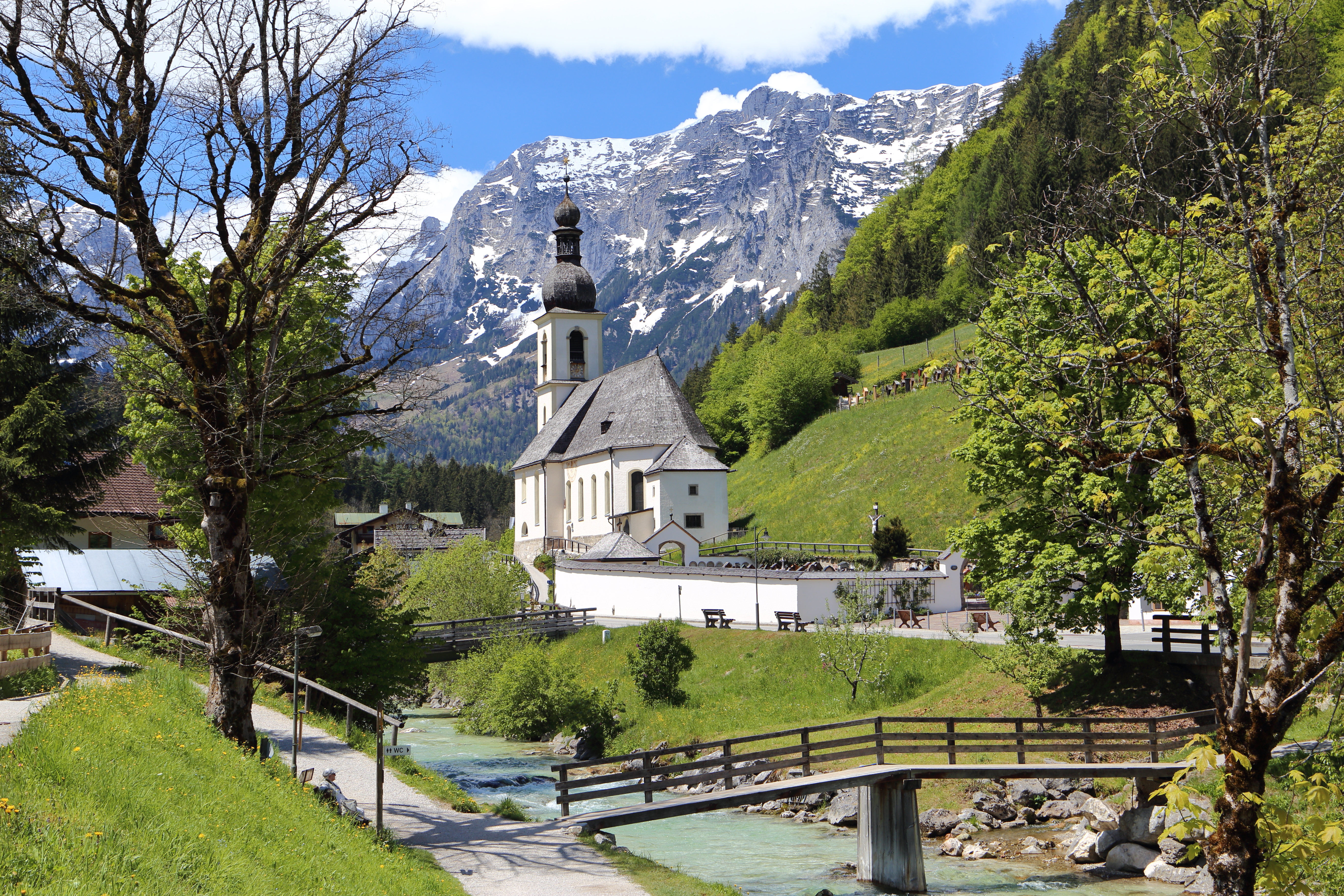 Pfarrkirche St. Sebastian in Ramsau bei Berchtesgaden aus der Malerwinkel-Perspektive